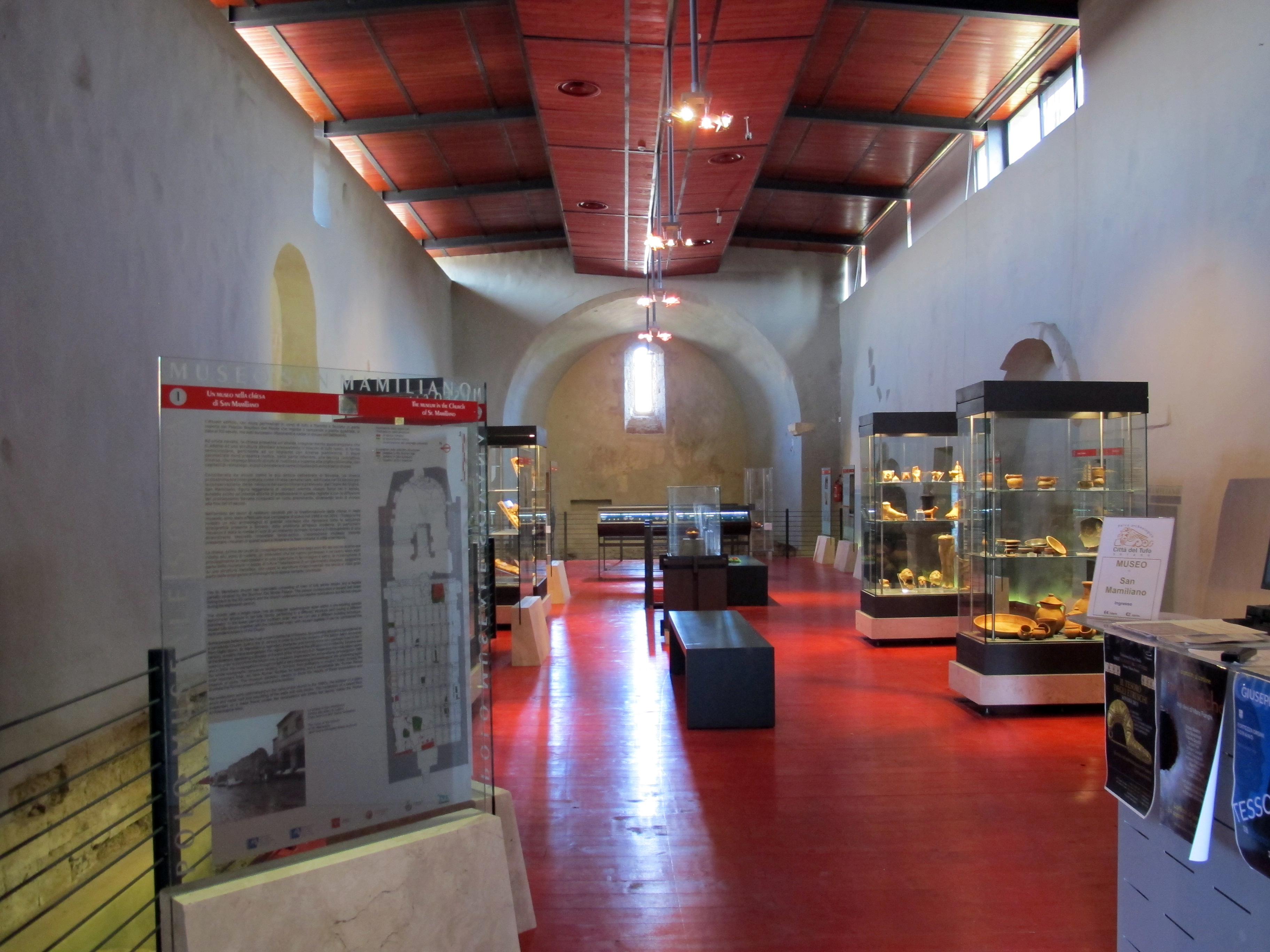 Sovana